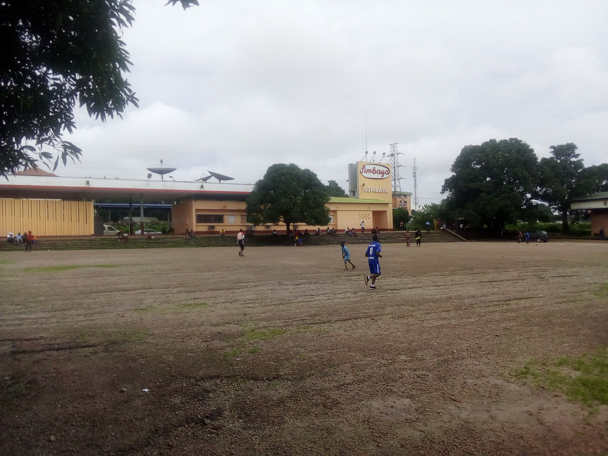 L'esplanade du gare de simbaya dans la Commune de Matoto Conakry